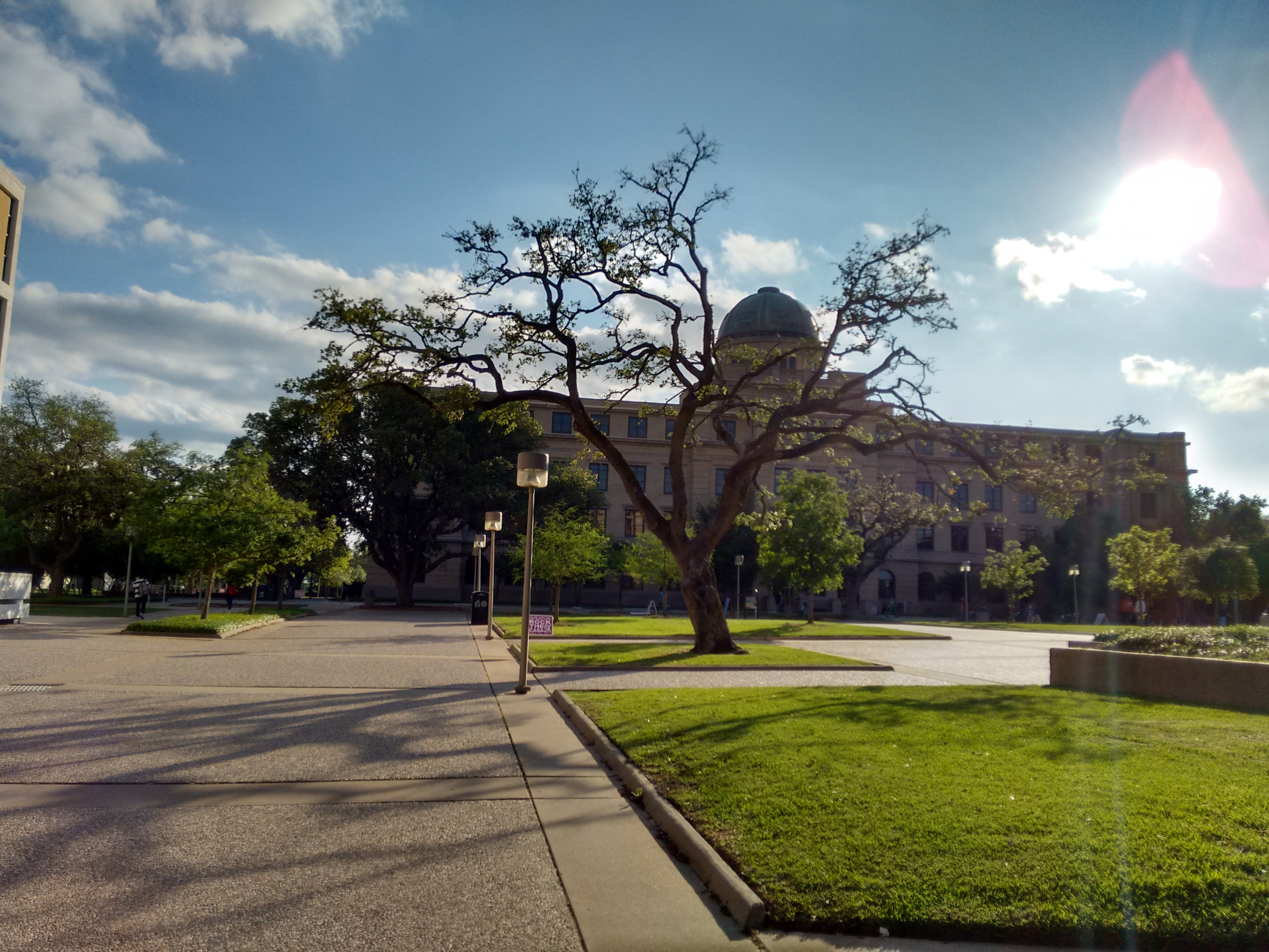 టెక్సాస్ ఏ అండ్ ఎం అకాడెమిక్ భవనం